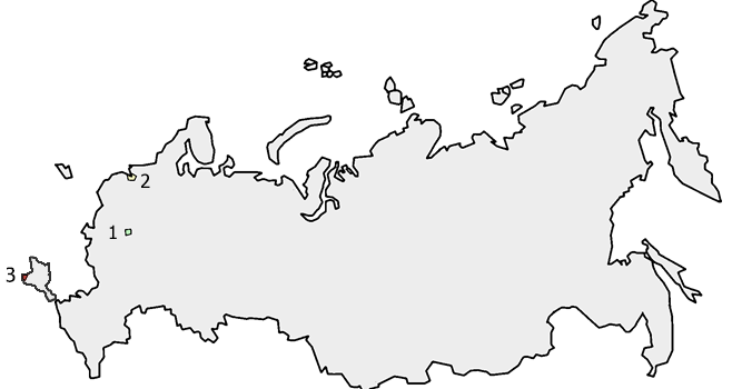 новое